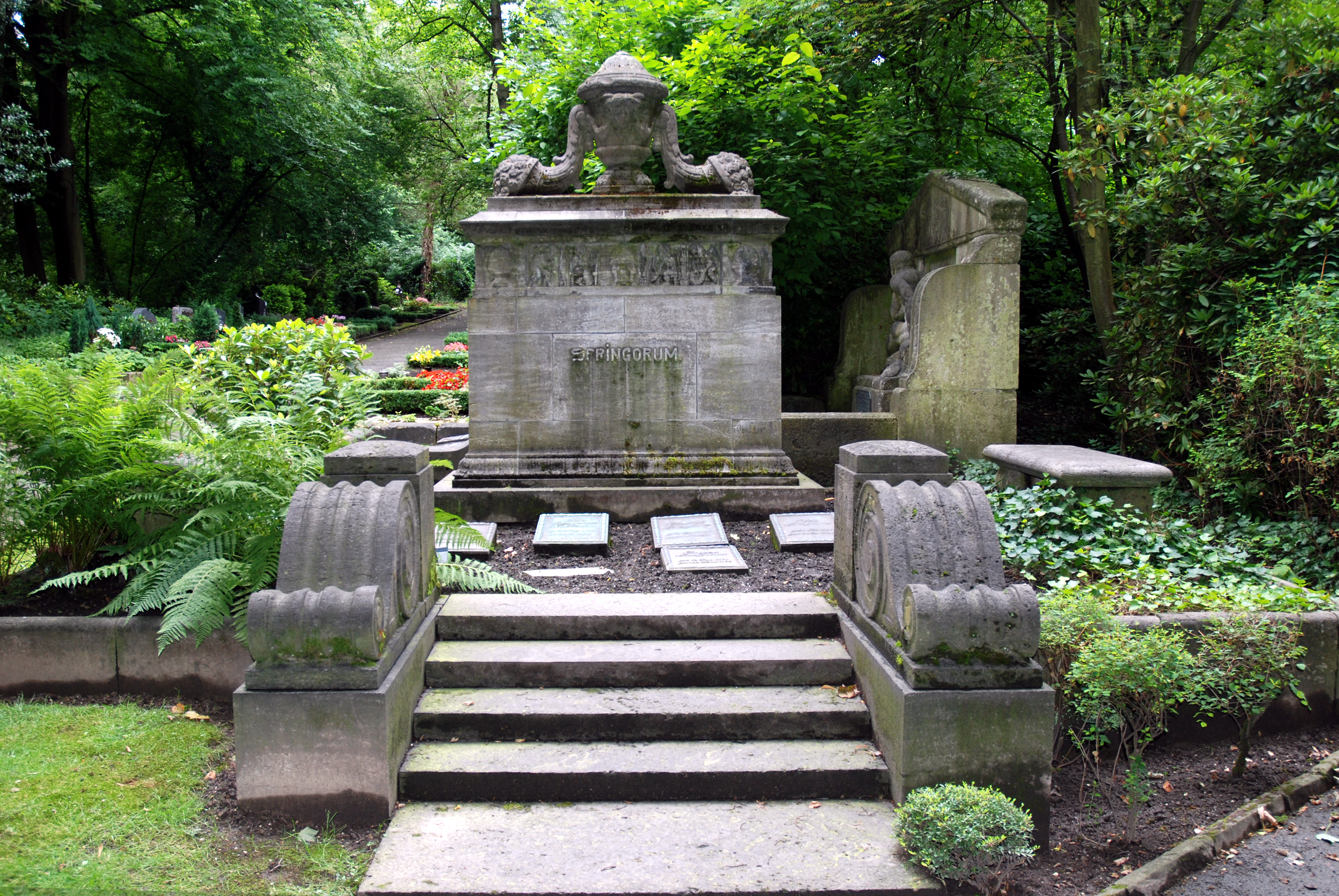 Dortmund, Ostfriedhof, Grab Springorum